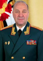 Начальник Главного управления Генерального штаба Вооруженных Сил Российской Федерации — заместитель начальника Генерального штаба Вооруженных Сил Российской Федерации генерал-полковник Игорь Сергун